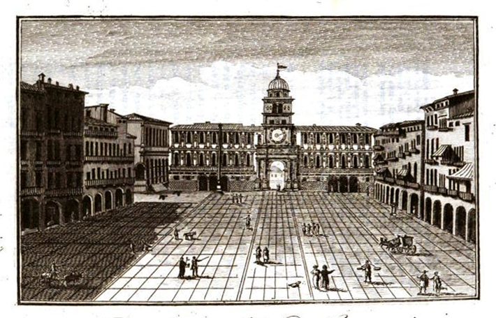 Piazza Signori, Padua, on 1817